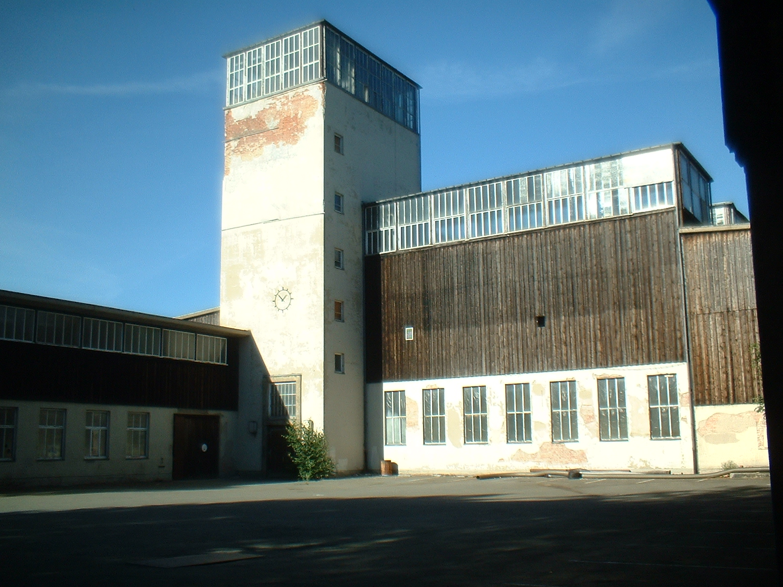 Armerzaufbereitung am Bollrich